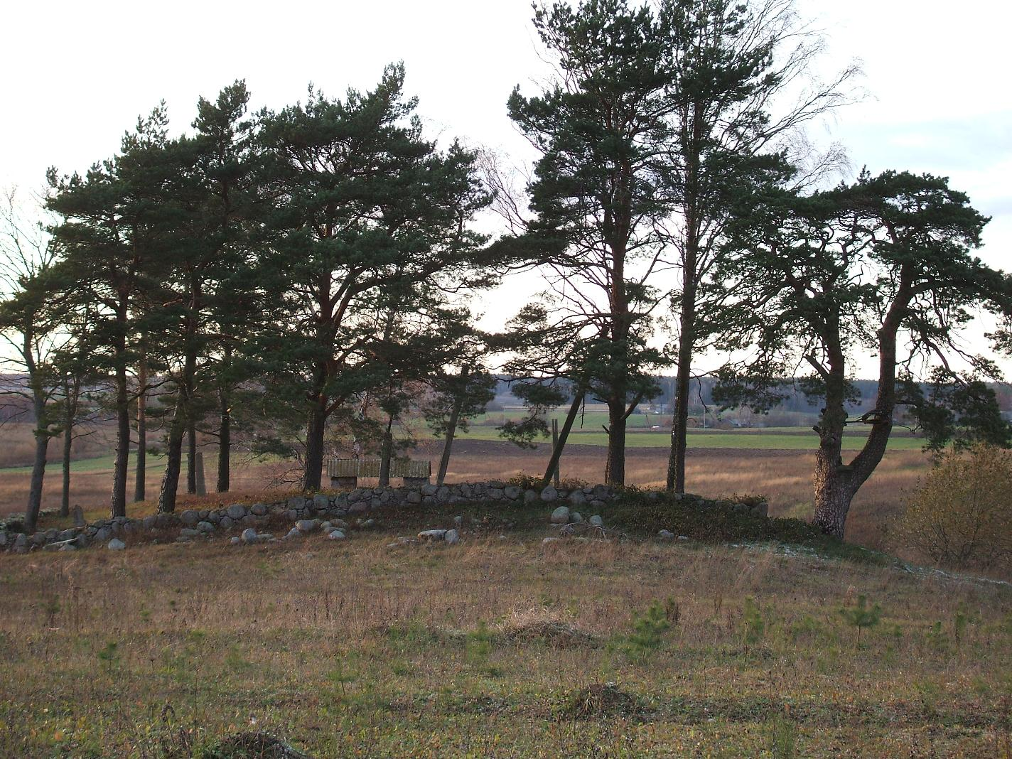 Varkujų kaimo kapinės 2006 m.